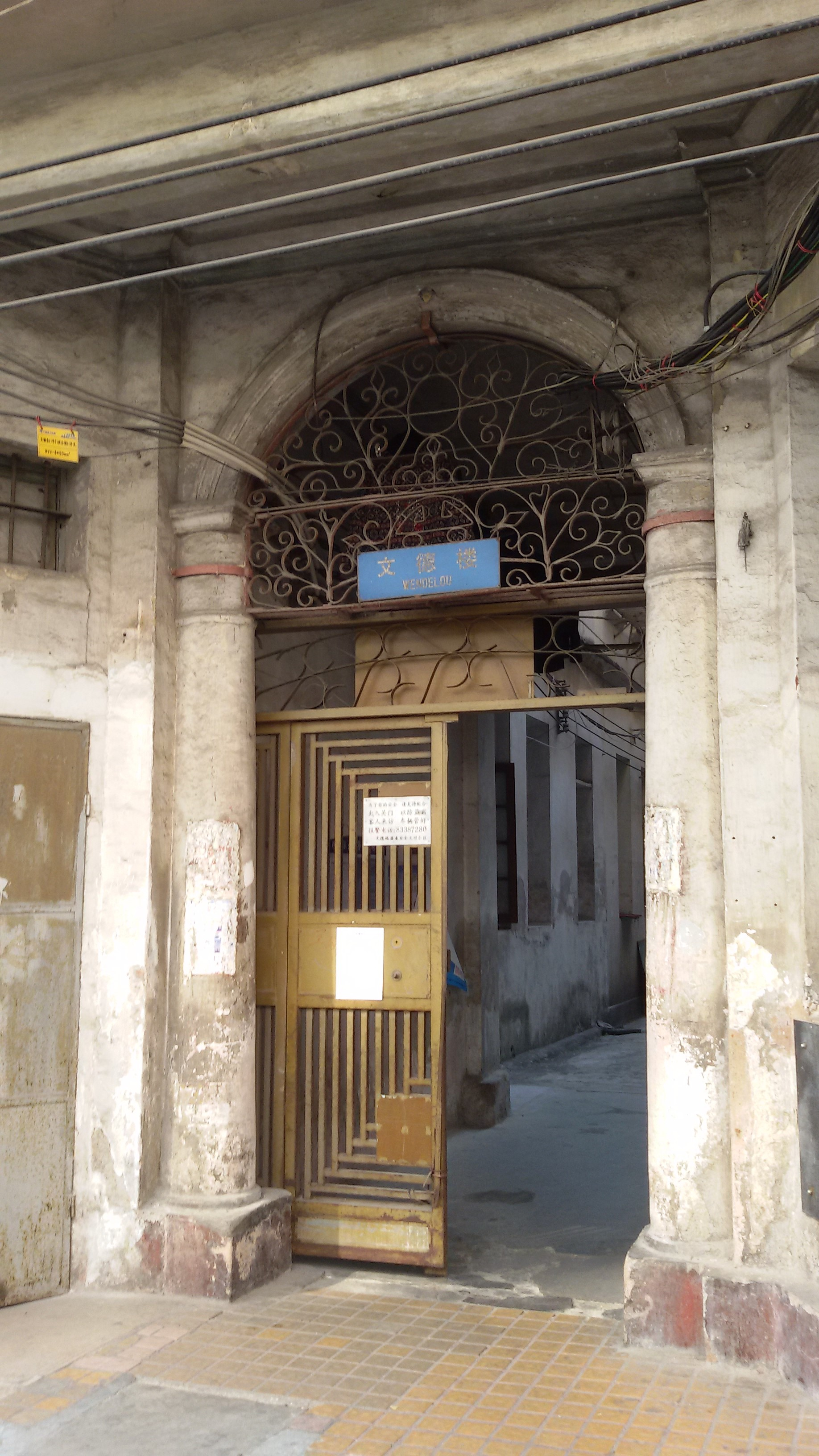 粵語: 文德樓嘅正門